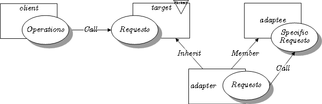 Adapter (Class) design pattern in LePUS3